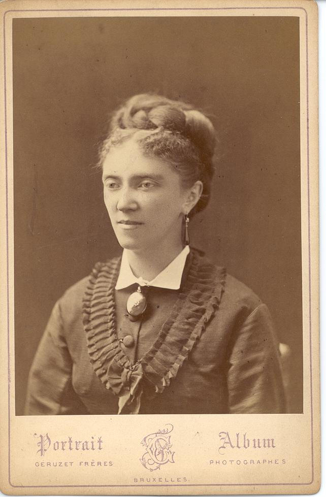 Hermine Straatman (1838-1917), épouse de Léon van Dievoet. Hermine (Mina) Henriette STRAATMAN, née à Bruxelles le 25 septembre 1838, décédée à Saint-Gilles le 21 février 1917, épousa à Bruxelles le 3 décembre 1867, Léon Philippe VAN DIEVOET, armateur, commissionnaire-expéditeur par eau (associé de Lambert Straatman), né à Bruxelles le 5 février 1838 et décédé à Forest le 26 juin 1908, fils d’Eugène et d’Hortense Poelaert (soeur du célèbre architecte), petit-fils de Jean-Louis et de Jeanne Wittouck, arrière-petit-fils de Jean-Baptiste et de Anne-Marie Lambrechts, arrière-arrière-petit-fils de Jean-Baptiste et d’Elisabeth van der Meulen, arrière-arrière-arrière-petit-fils de Jean-Baptiste van Dievoet, né à Bruxelles le 6 mars 1663, et de Anne van der Borcht.